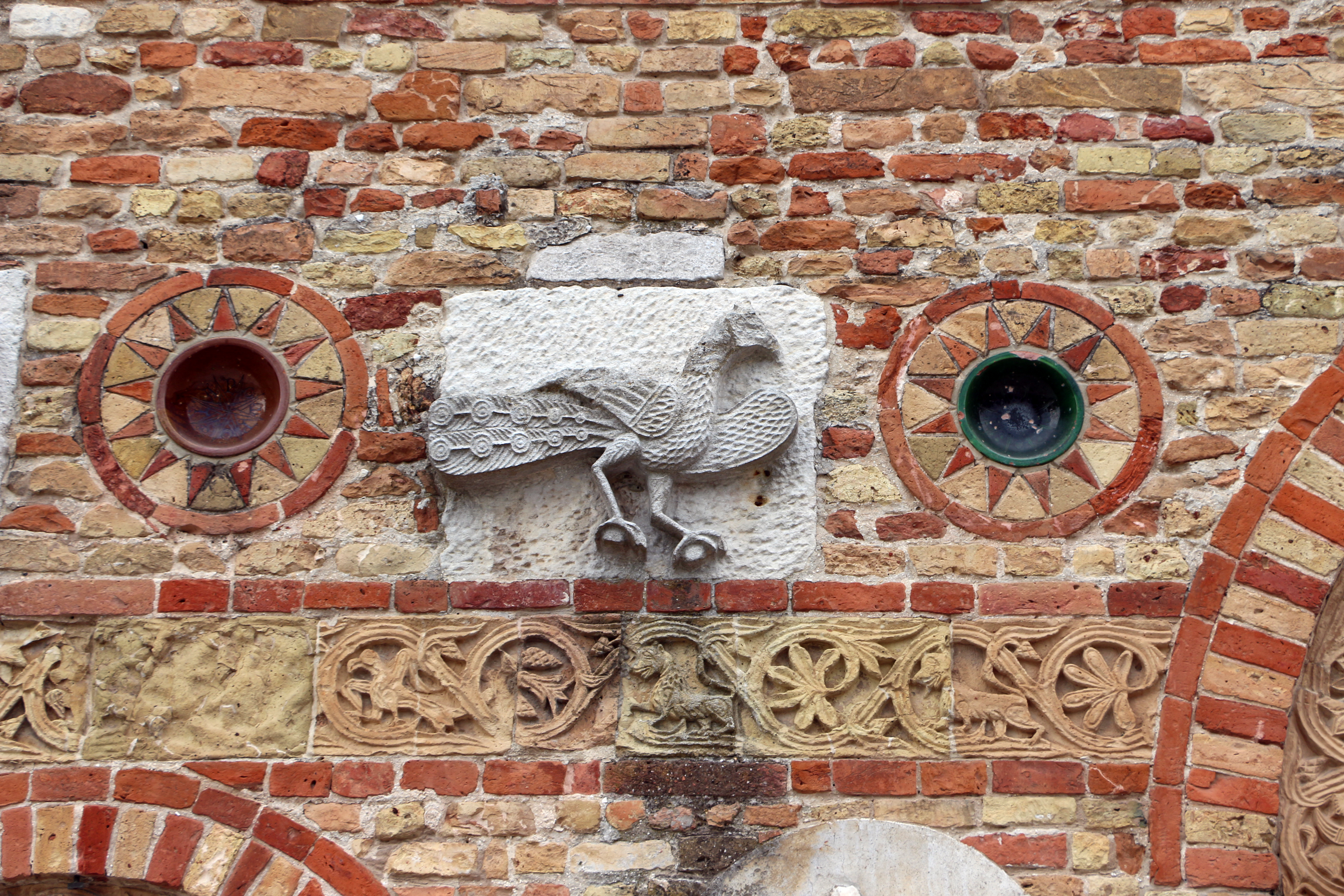 Abbazia di Pomposa This is a photo of a monument which is part of cultural heritage of Italy.